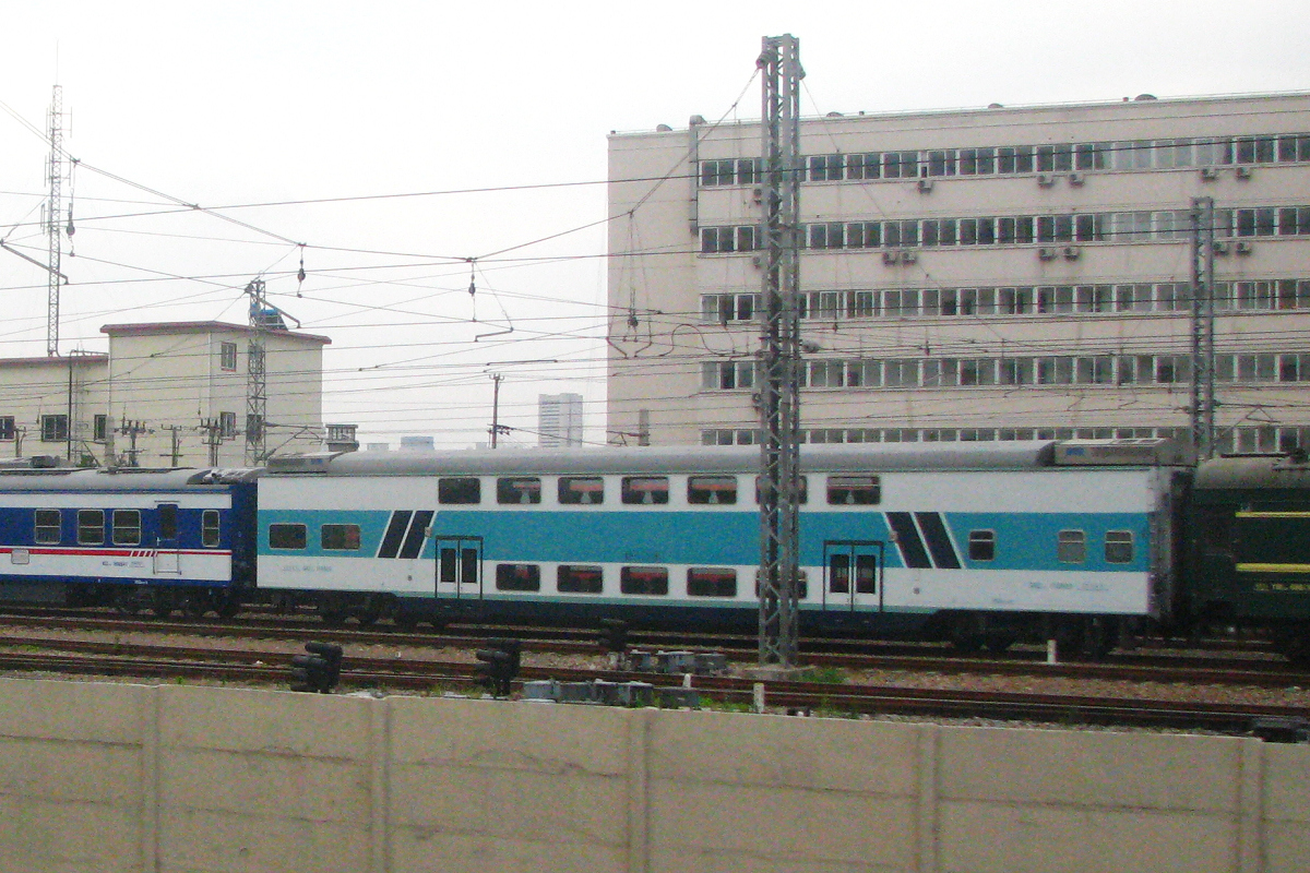 长春客车厂生产的25K型双层软座车